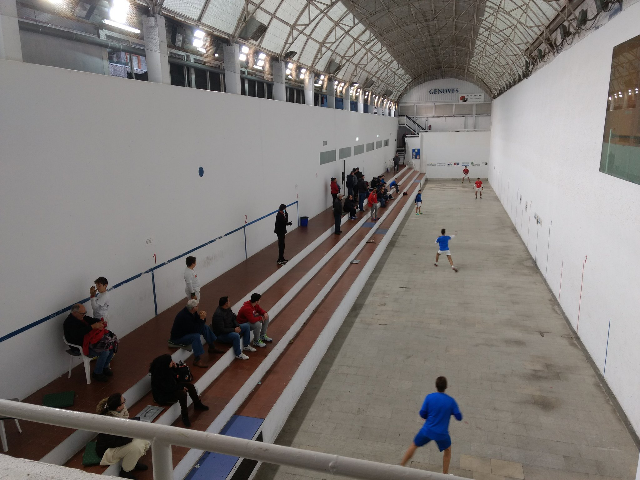 Partida de juvenils al trinquet del Genovés.